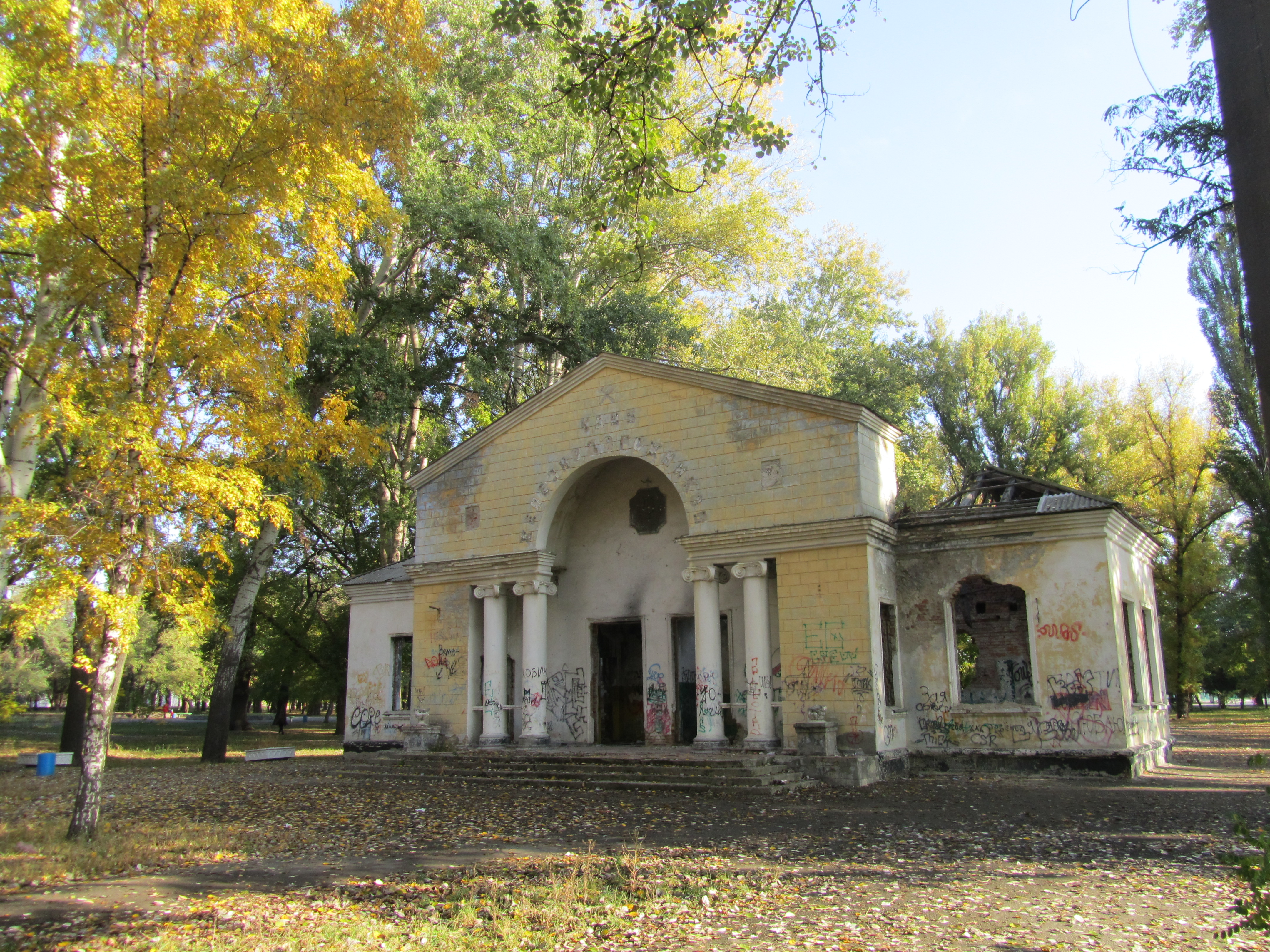 Міський сад, Кременчуцький р-н, м. Кременчук, біля електростанції